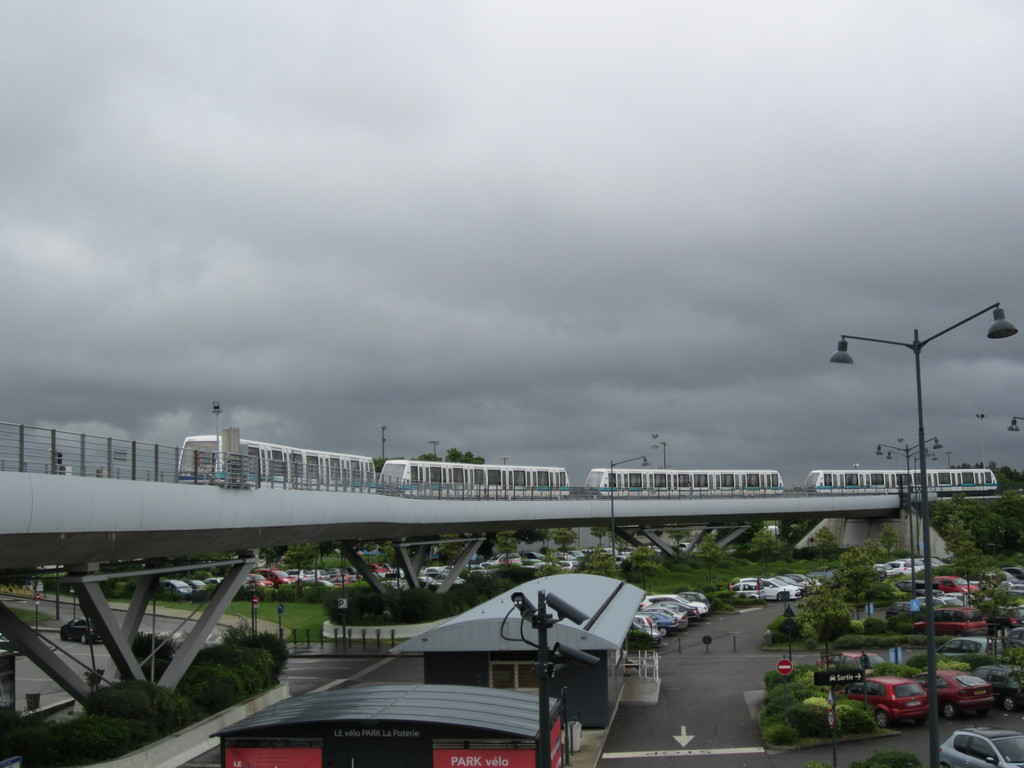 VAL 208 garés au terminus de la ligne a, à La Poterie (réseau STAR de Rennes).